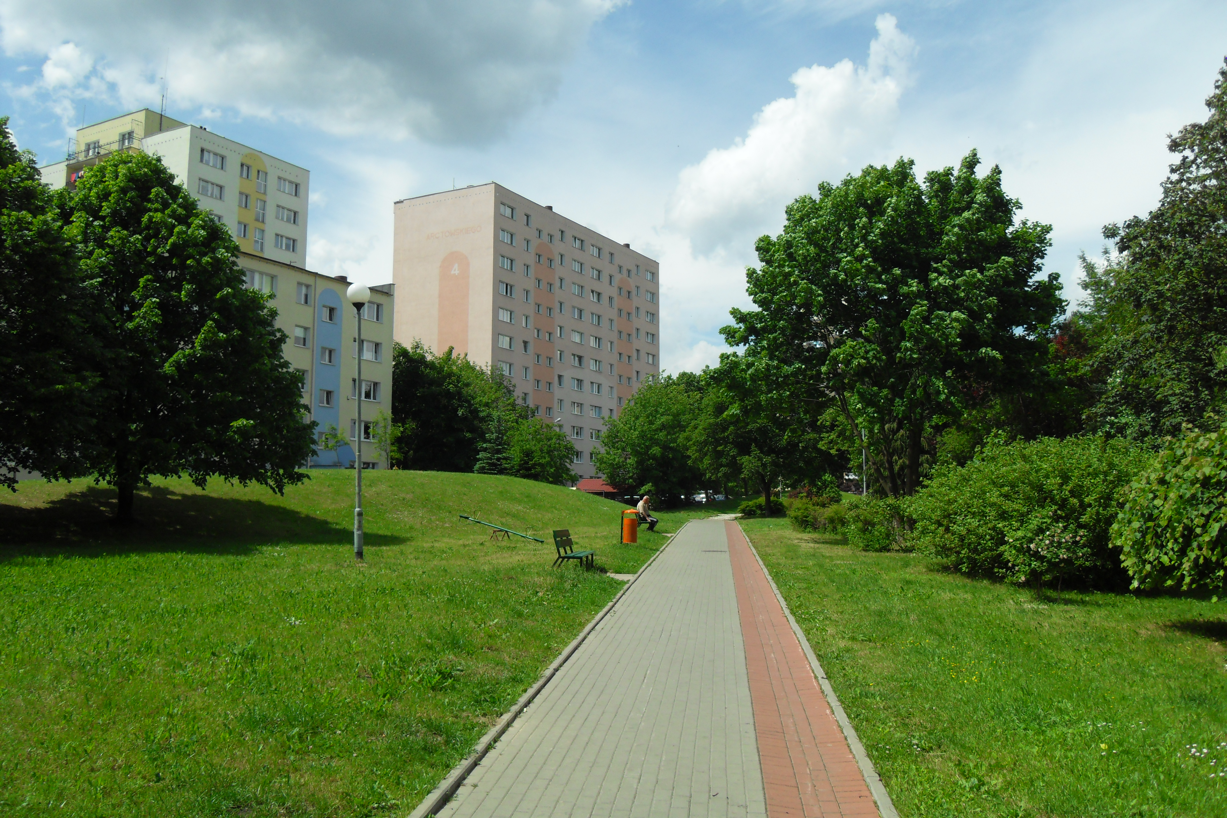 Gdańsk Piecki, bloki przy ul. Arctowskiego.